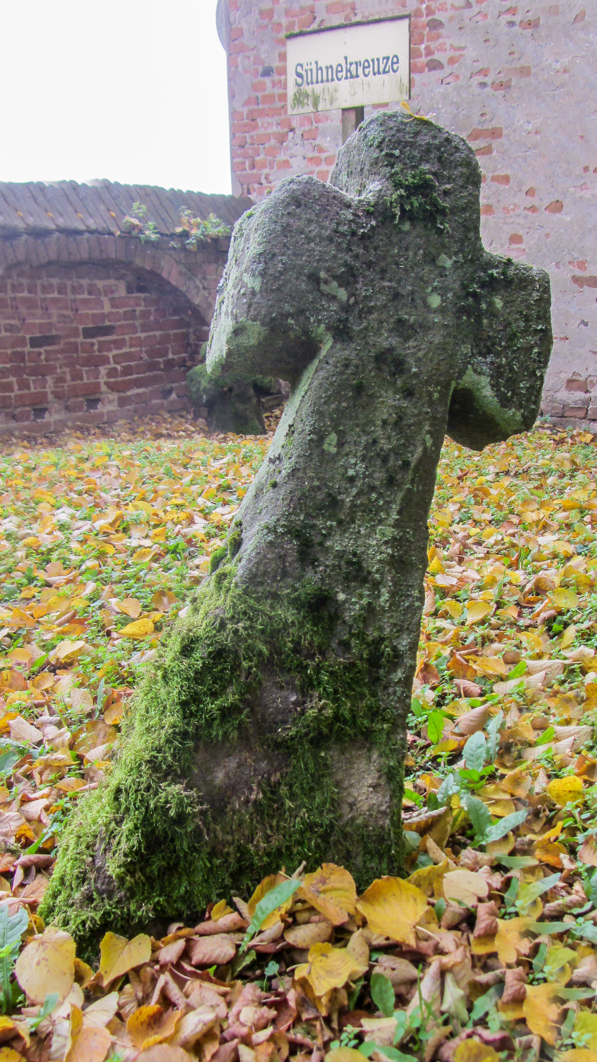 Steinkreuz II auf dem Kirchhof in Berge OT von Hansestadt Werben (Elbe) Bodendenkmal in: Werben (Elbe)